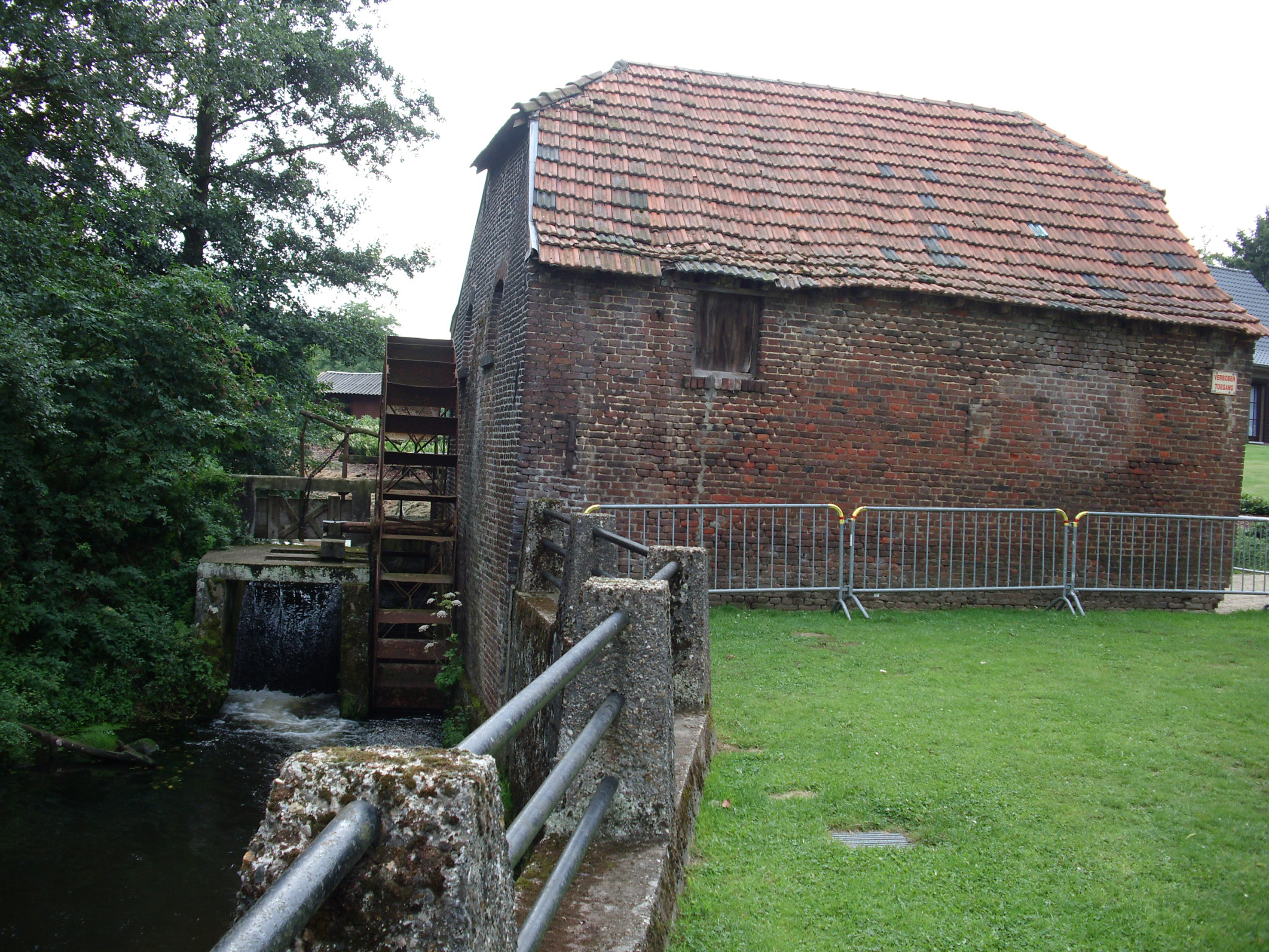 Dorpermolen - Opoeteren - Maaseik - Limburg - Vlaanderen - België